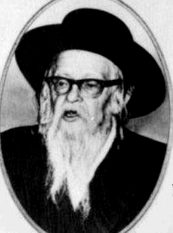 Rabb Dov Berish Weidenfeld, Chief Rabbi of Tchebein (Trzebinia), Poland.